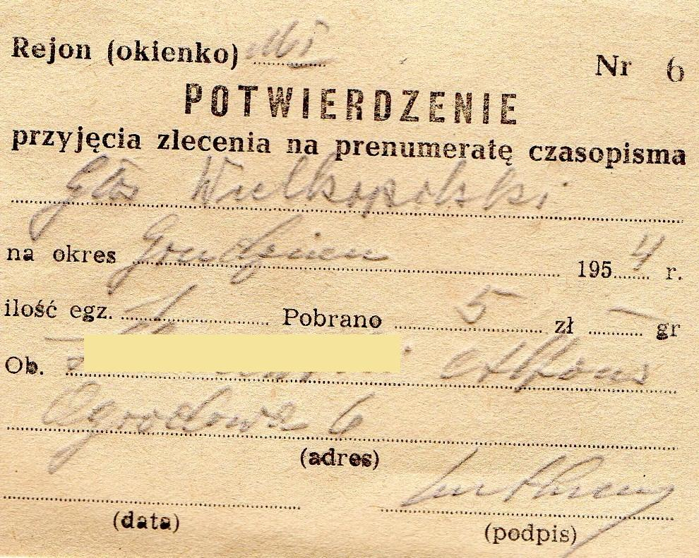 Prenumerata Głosu Wielkopolskiego z 1954r.